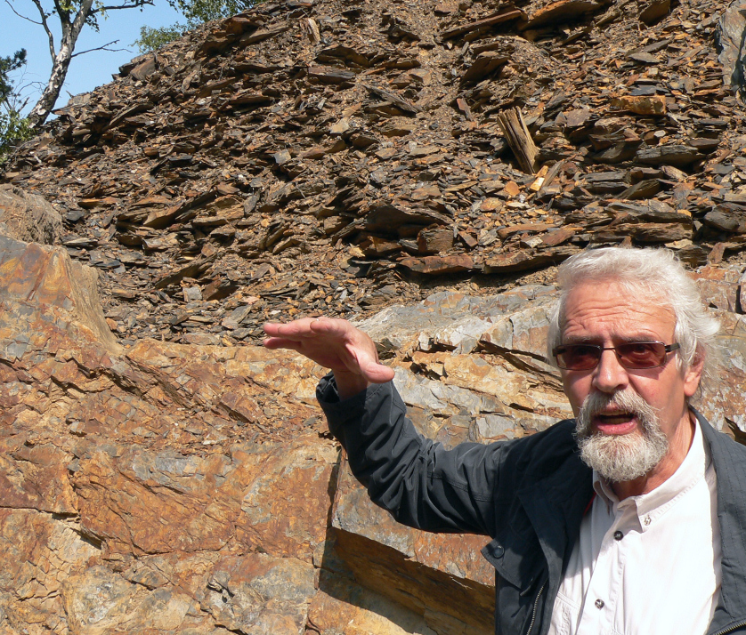 Dr. Lothar Klappauf erläutert einen alten Hohlweg am mittelalterlichen Bergwerk im Alten Lager am Rammelsberg